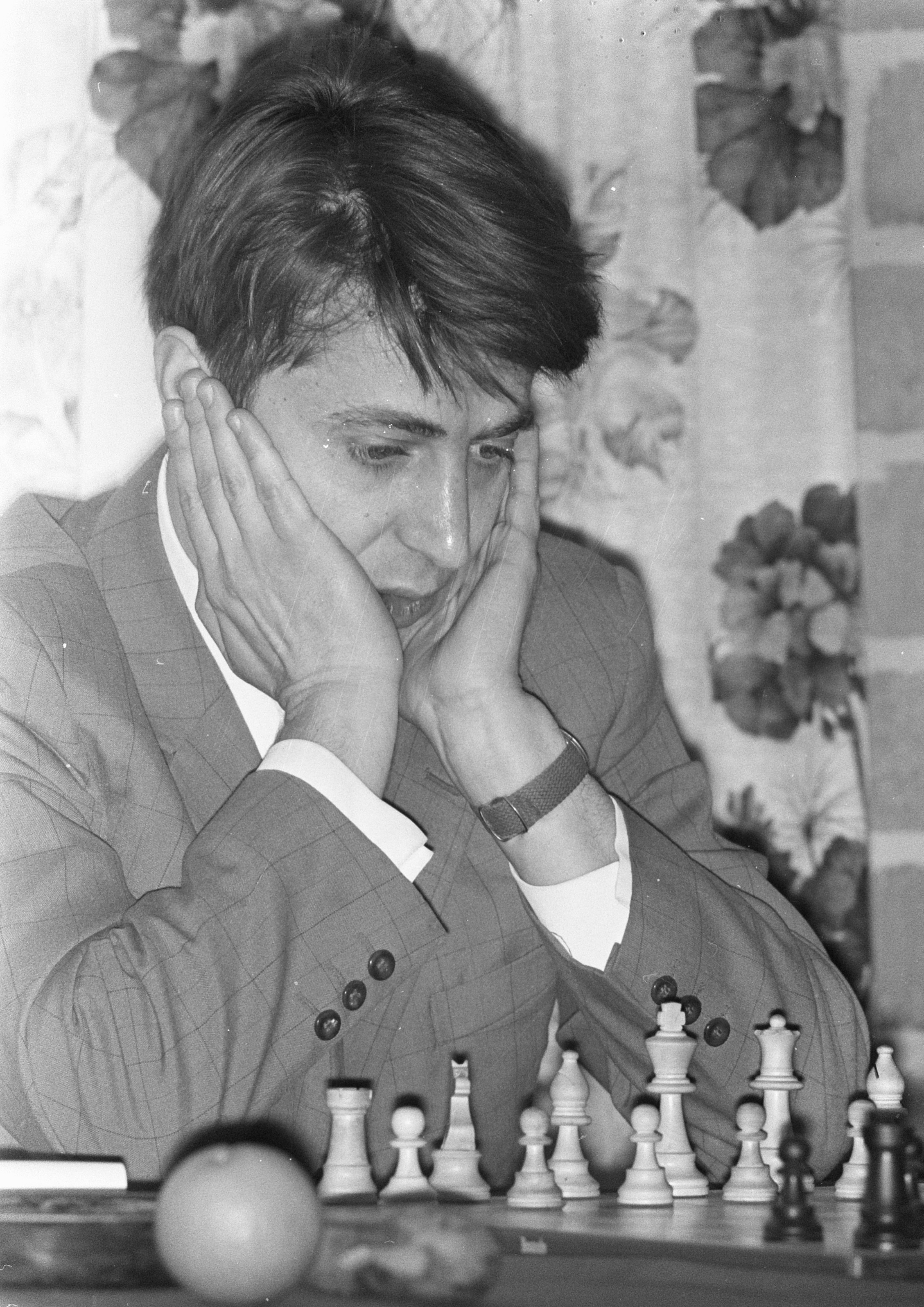 Vladimir Savon